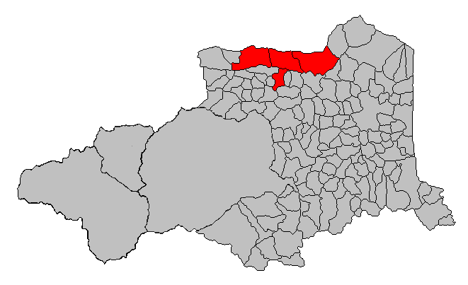 Localització de la denominació AOC Maury